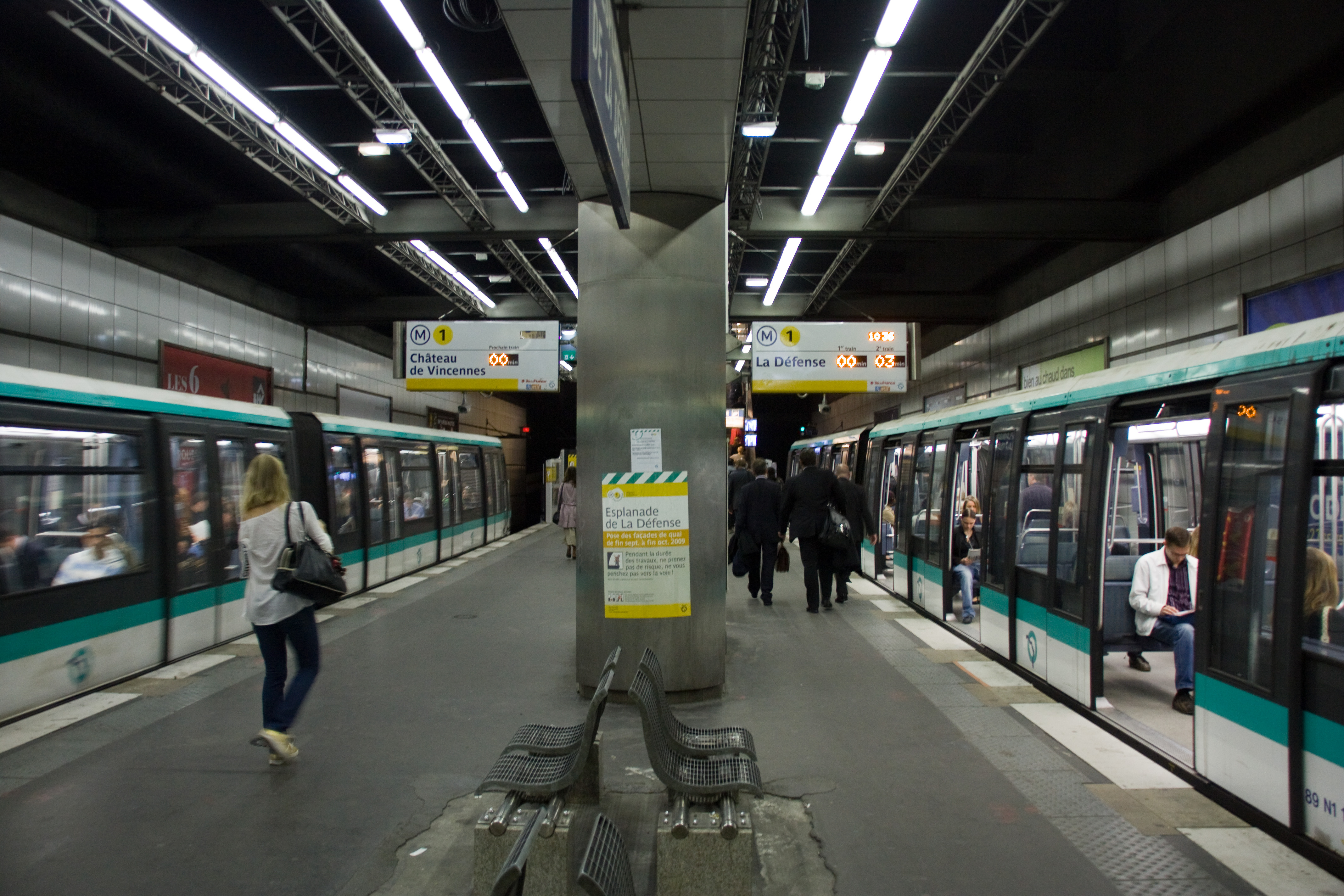 Station Esplanade de la Défense, Ligne 1 métro de Paris.